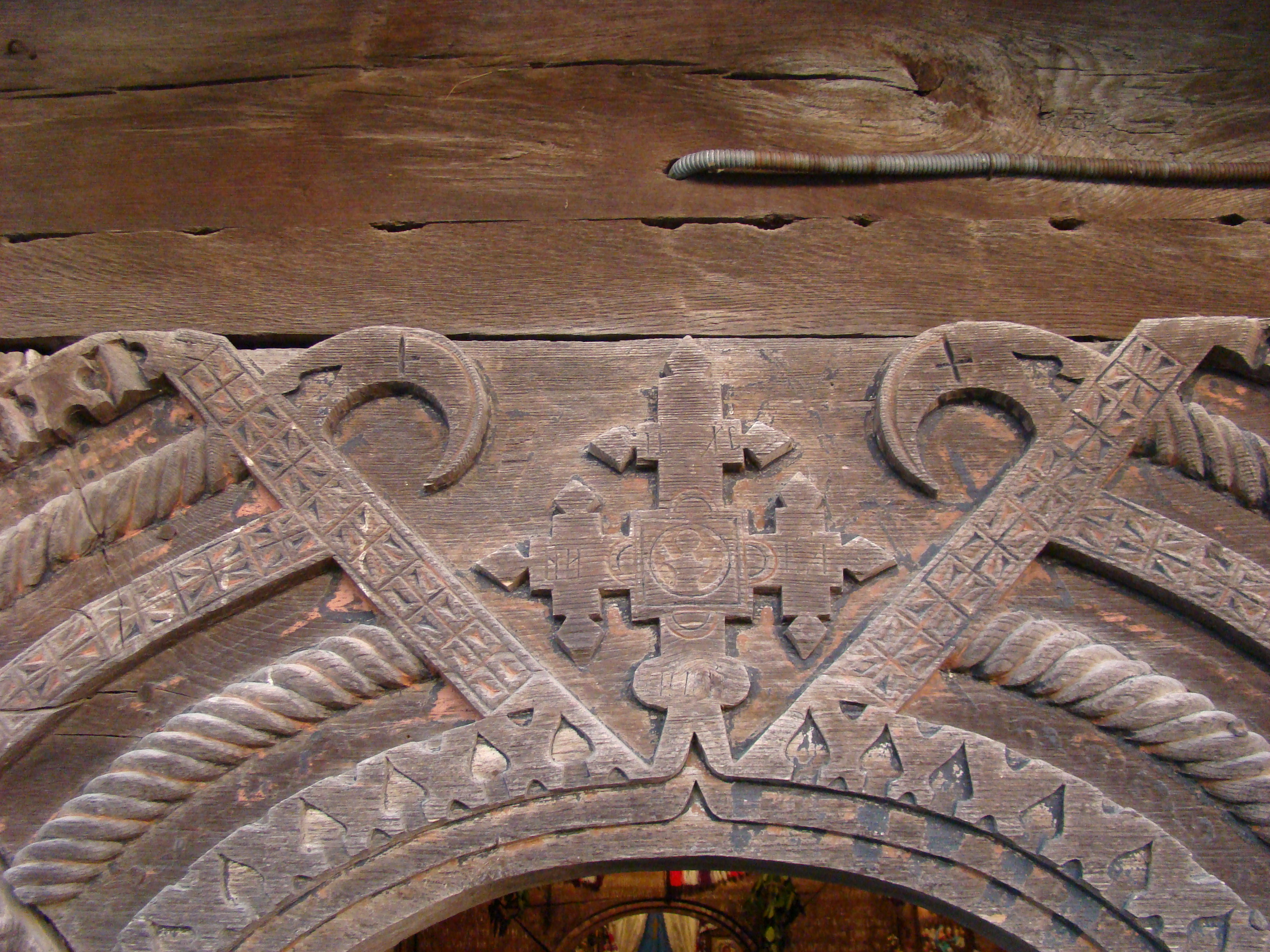 Biserica de lemn "Sf. Ioan Teologul", sat BRĂDET; comuna BUNTEŞTI